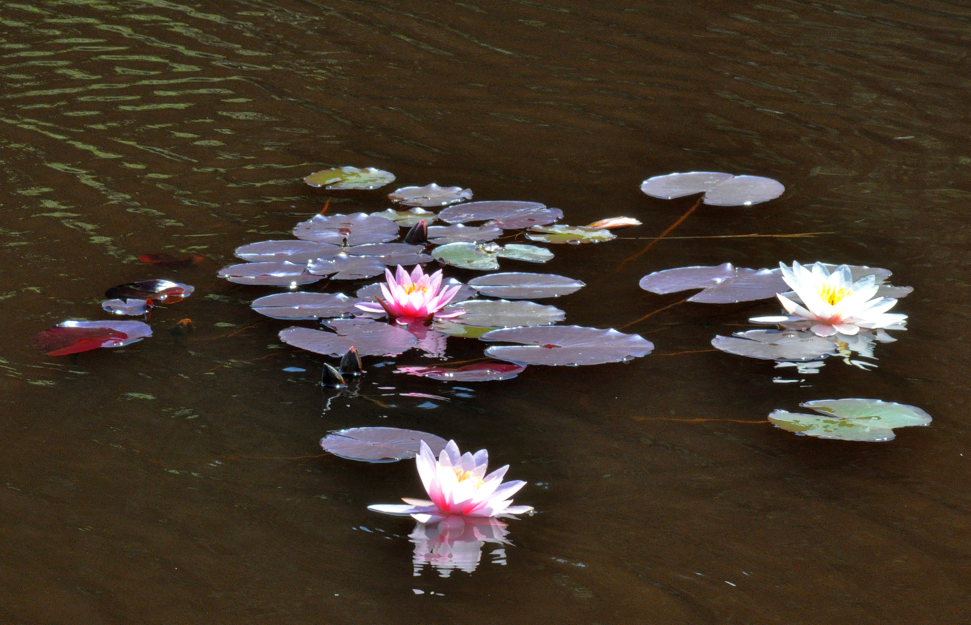 Seerosen am Großen Staudacher Weiher